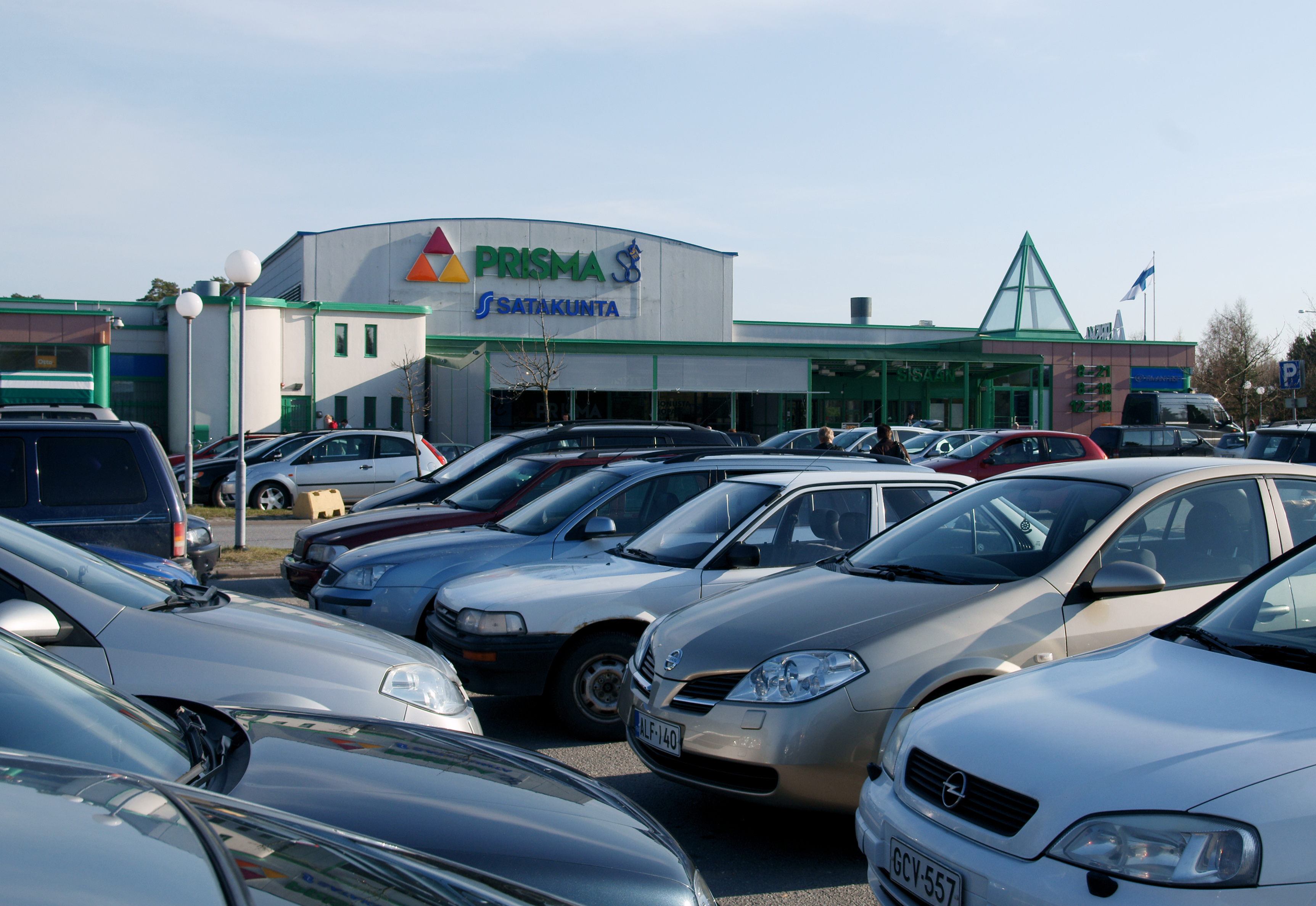 Länsi-Porin Prisma.